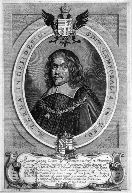 Der kaiserliche Berater und Minister Maximilian von und zu Trauttmansdorff (1584-1650), "Maximilianus Comes de Trautmanstorff, et Weinsberg Baro in Gliechenberg, Neostadij, ad Kocher am Negau Burgau et Totzenbach, Dns. in Teinies et Leithomisch, Eques Aurei Velleris, Sacrae Caes. Mtis. Consiliarius Intimus, Cubicularius Supremus, Aulae Praefectus, Castelli Gretziensis Capitaneus, atque ad Tractatus Pacis Universalis, tam Monasterij, quam Osnabrugi, eiusdem suae Caesa. Mtis. Nomine, Legatus Plenipotentiarius Primarius; Anselmus van Hulle Pinxit. Petrus de Iode sculpsit"